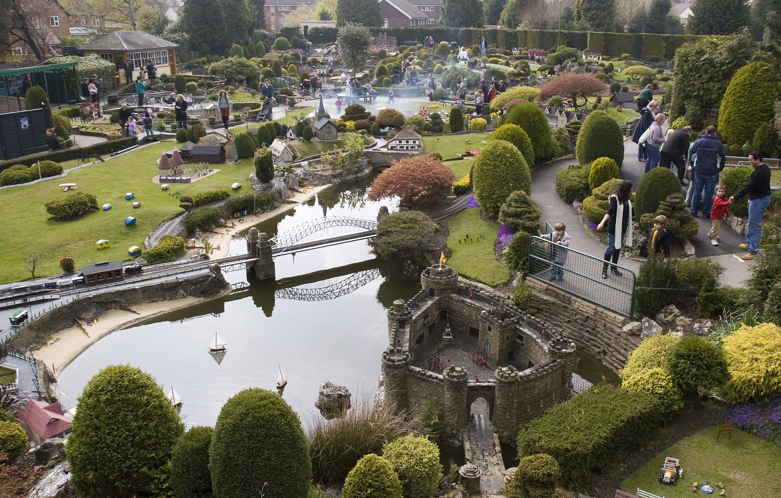 General view, Bekonscot